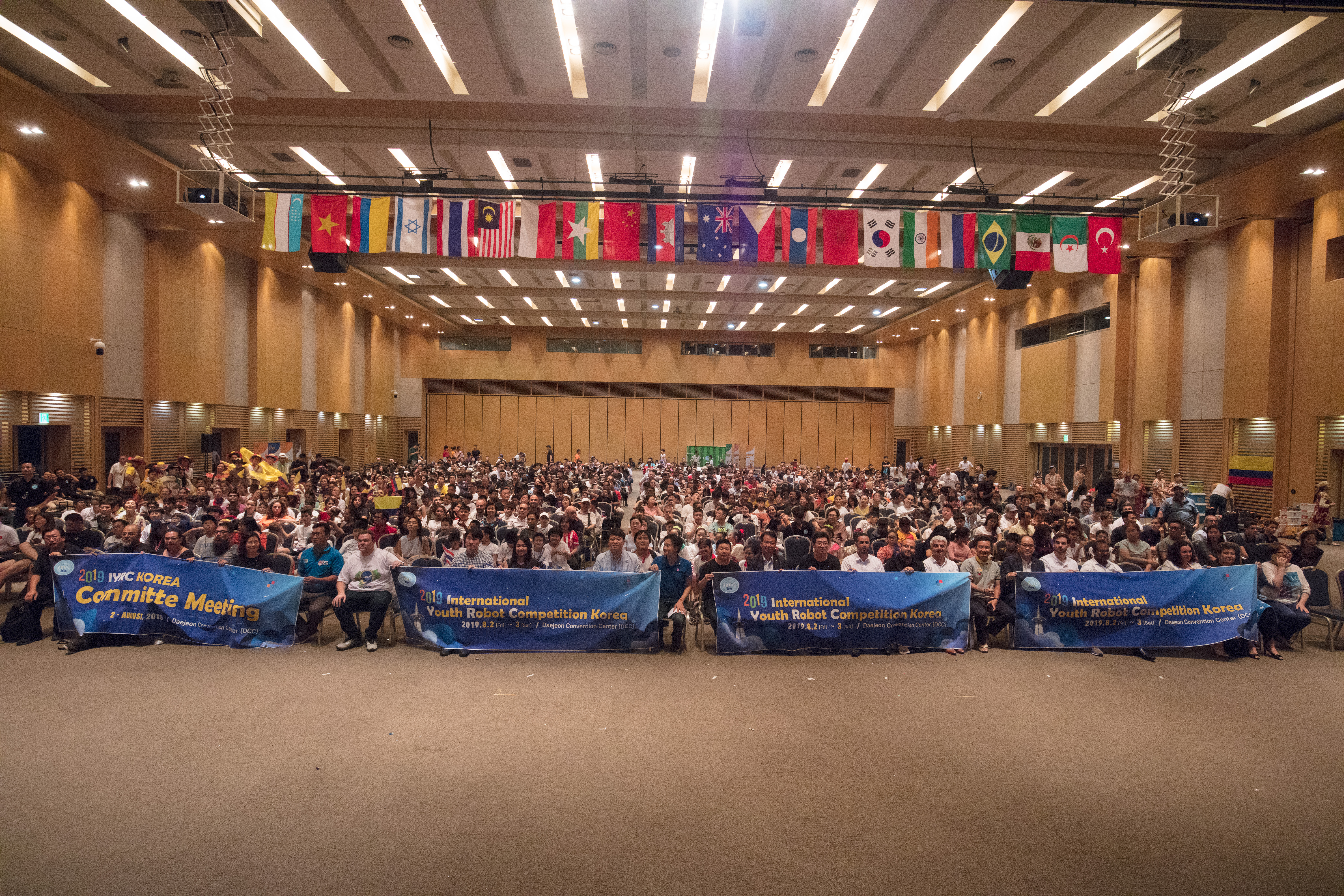 대전로봇융합페스티벌 행사